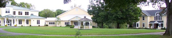 Maplebrook School